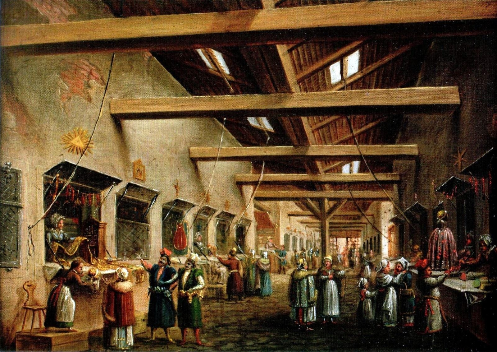 Wnętrze Kramów Bogatych ok. 1800 roku. Obraz olejny Michała Stachowicz w zbiorach Muzeum Historycznego Miasta Krakowa